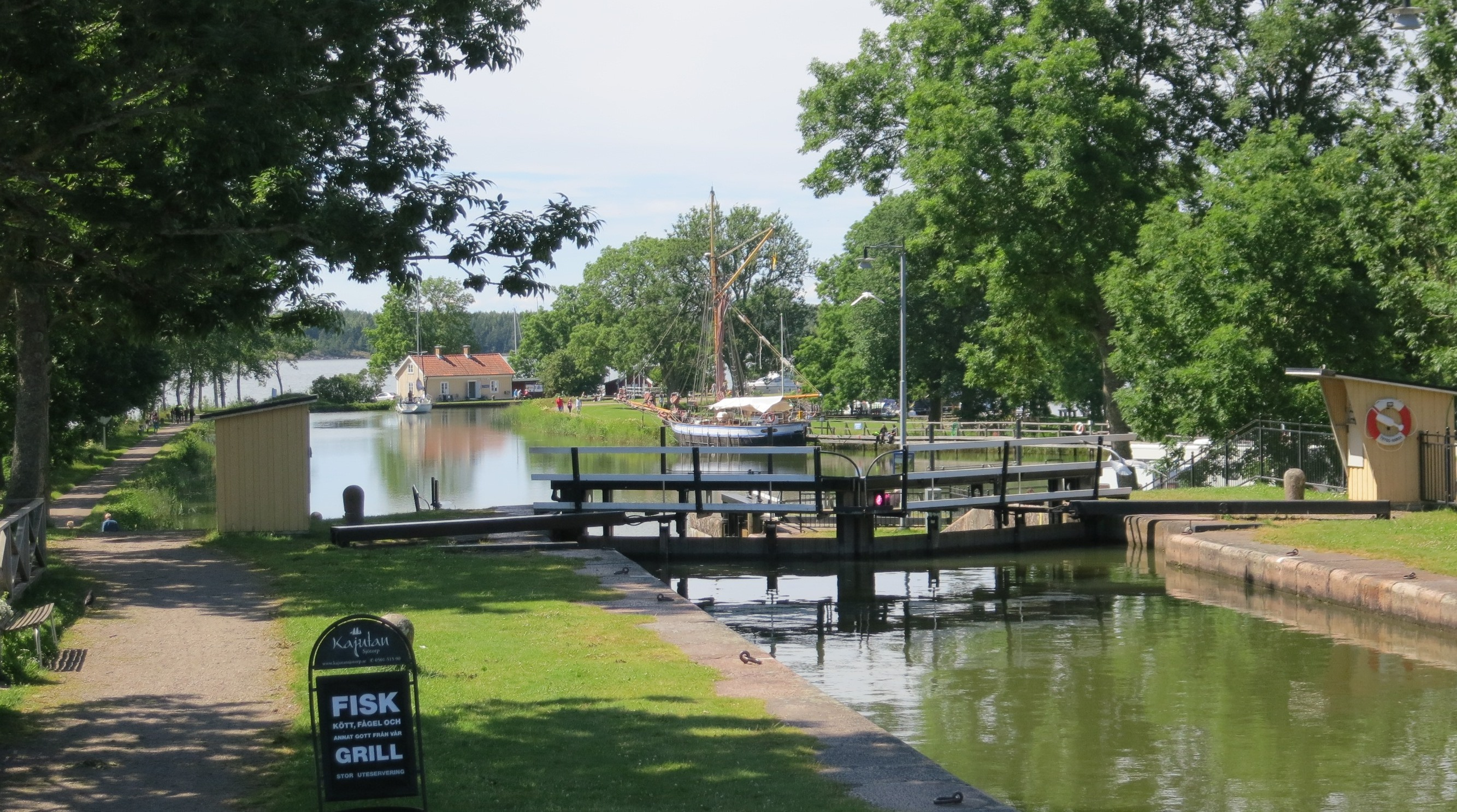 Sjötorp, sluss, Göta kanal